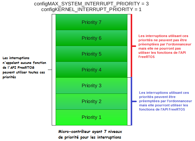 Exemple de priorités d'interruptions pour un micro-contrôleur possédant 7 priorité matérielles.